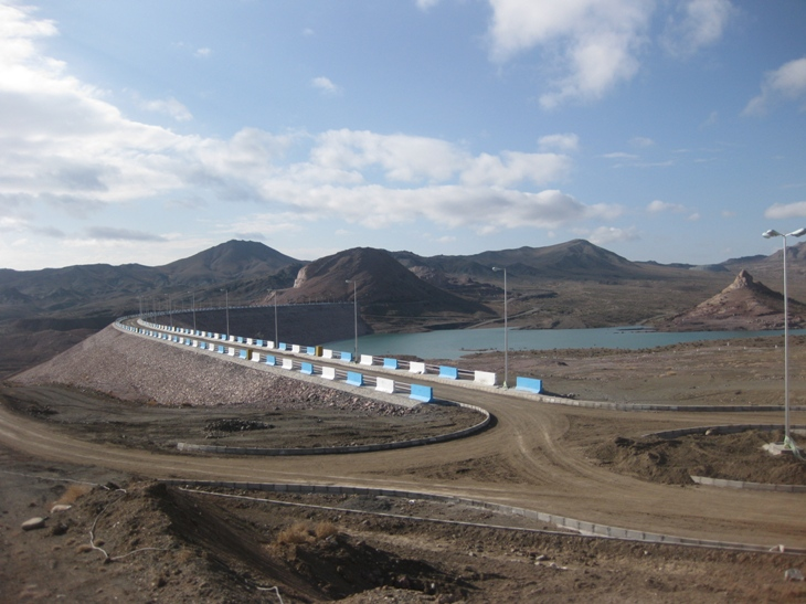 سد آسیاب جفته asiab jofte dam